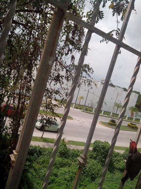 Carpintero Cabeza Roja en Poza Rica, Veracruz, México